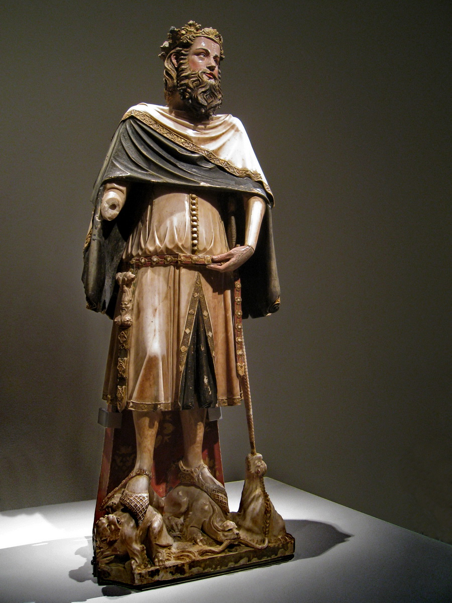 Pere IV d'Aragó "el Cerimoniós", la imatge és de 1345 obra de Jaume Cascalls (Berga, prin. del segle XIV – c. 1378) i és coneguda com "Sant Carlemany". Es troba a la Catedral de Girona. És una figura d'alabastre policromat que representa la figura del rei Pere el Cerimoniós i que fou objecte de culte a l'altar de la capella dels Sants Màrtirs des que el bisbe Arnau de Mont-rodon instituí el culte a sant Carlemany l'any 1345.